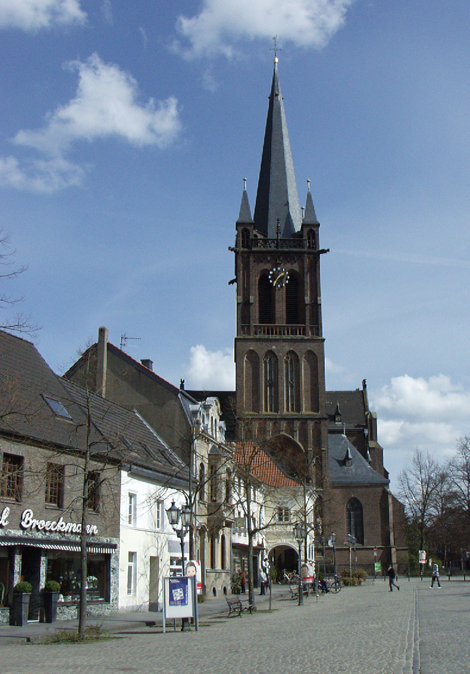 Krefeld Hüls, Marktplatz mit der Kirche St. Cyriakus